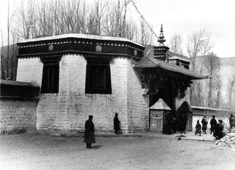 Lhasa, Eingangstor zur Sommerresidenz des Dalai-Lama